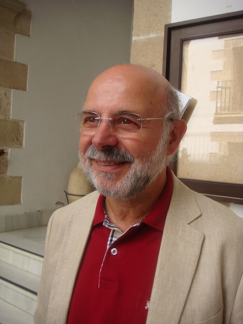 Javier Maldonado Rosso. Dr. En Historia. Director del Centro Municipal de Patrimonio Histórico de El Puerto de Santa María. Experto en la Cultura del Vino.